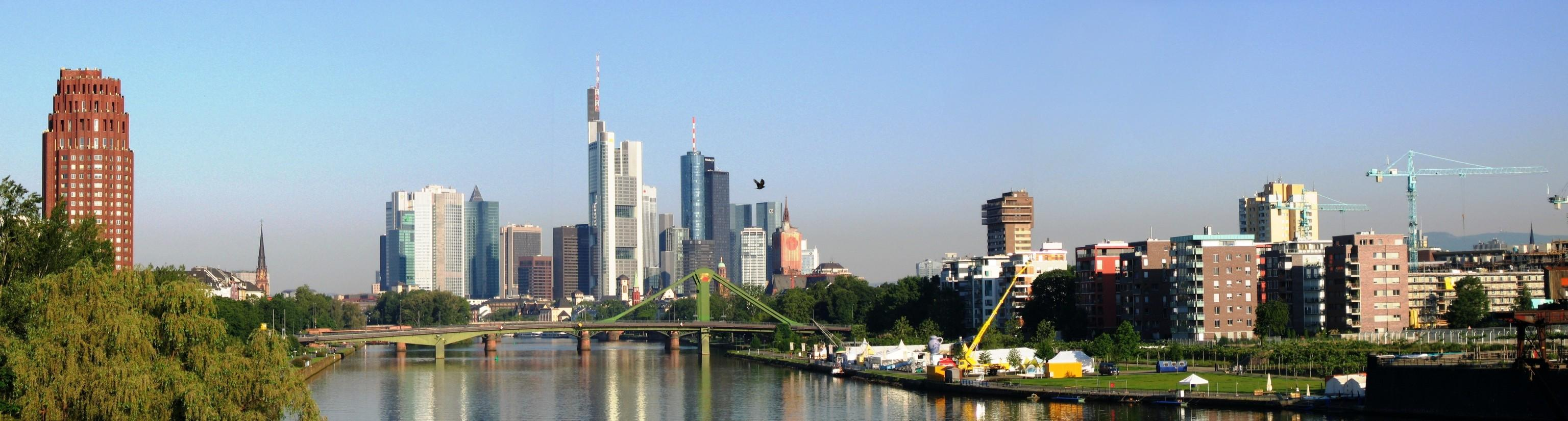 Main-Plaza-Hotel (links) in Frankfurt im Mai 2005 und seine Umgebung, selbst fotografiert, GNU-FDL